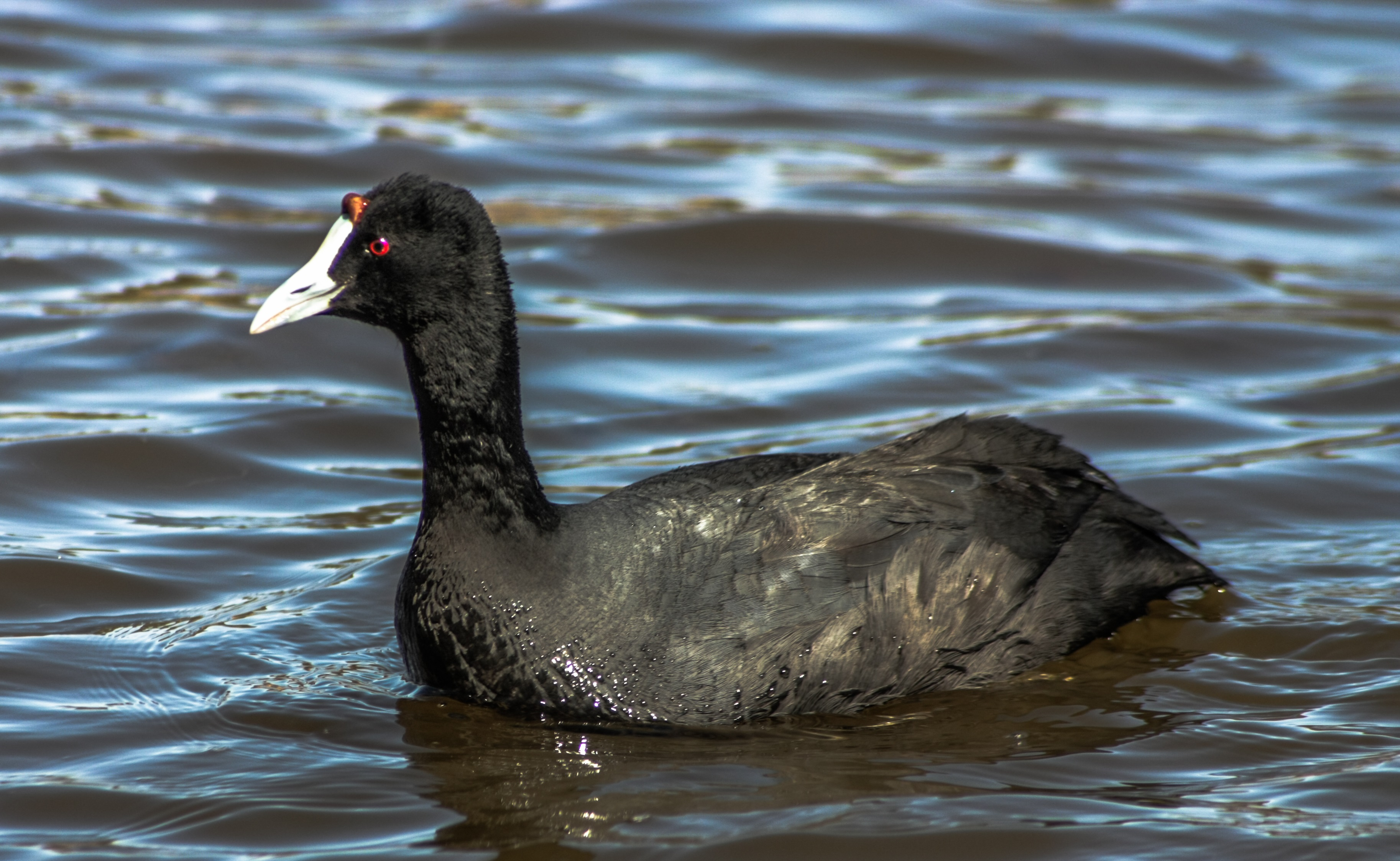 Fulica cristata, Lac Aoua, Ifrane, Morocco